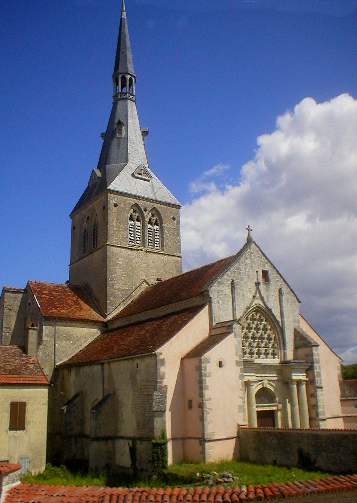 Belan-sur-Ource (Côte-d'Or) - l'église Prise de vue personnelle. Siren 22 août 2005 à 11:07 (CEST)